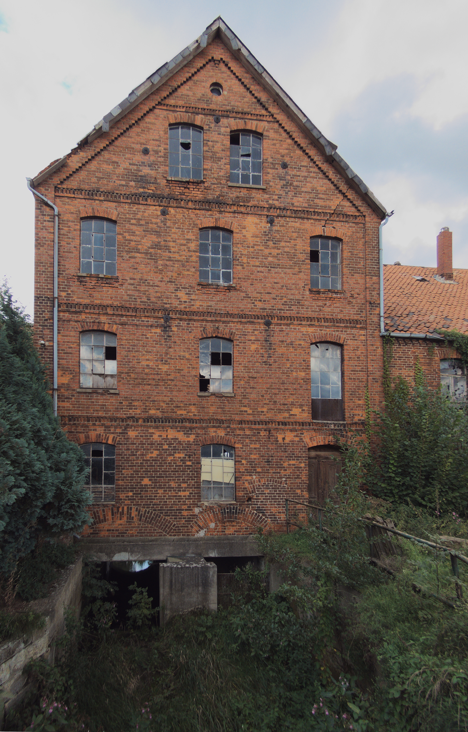 Die ehemalige Weizenmühle im Ronnenberger Stadtteil Vörie wurde 1957 stillgelegt. Das Gebäude steht seit Jahrzehnten leer. Bis zu seiner Deregulierung im Sommer 2011 floss der hier Landwehr genannte kanalisierte Oberlauf der Ihme durch das Gebäude. Unmittelbar vor dem Gebäude quert die als Fotostandort genutzte Kreisstraße von Weetzen nach Vörie das Gewässer.